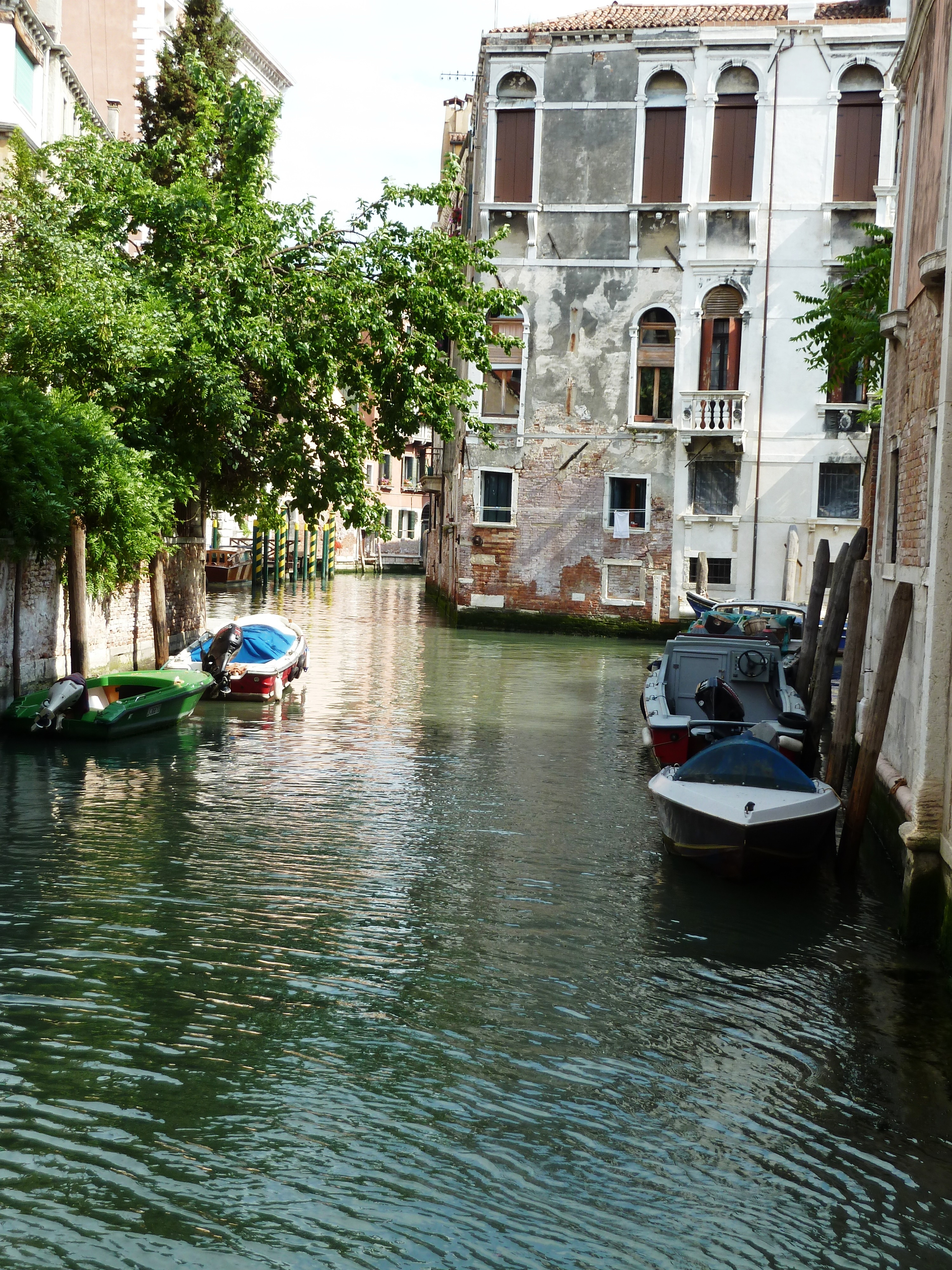 Rio di Sant'Agostin (Venice)